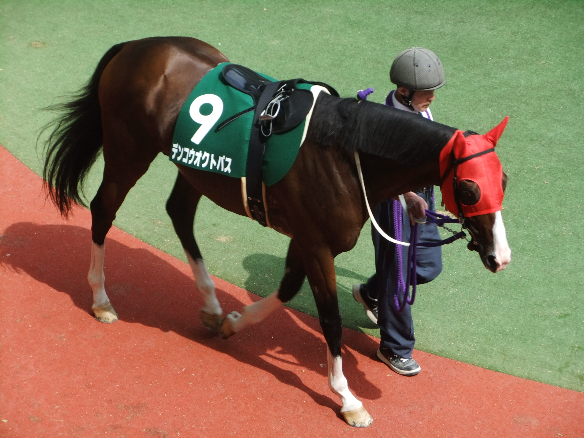 デンコウオクトパス 2013年9月14日 阪神競馬場